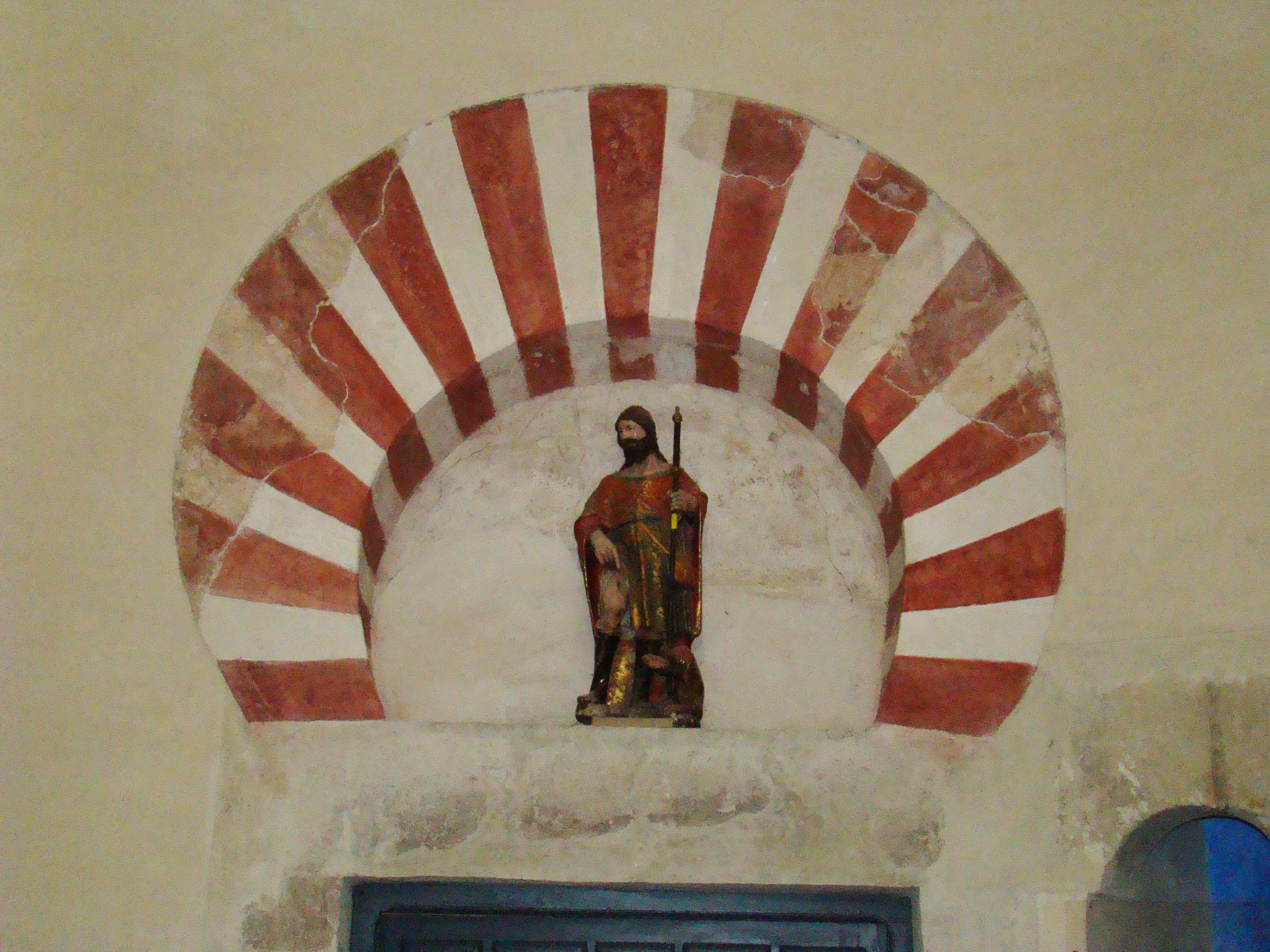 Iglesia mozárabe de San Cebrián en la localidad de San Cebrián de Mazote, Valladolid, España. Detalle del arco mozárabe restaurado con su pintura. En el centro se encuentra la imagen de San Roque del siglo XVII.